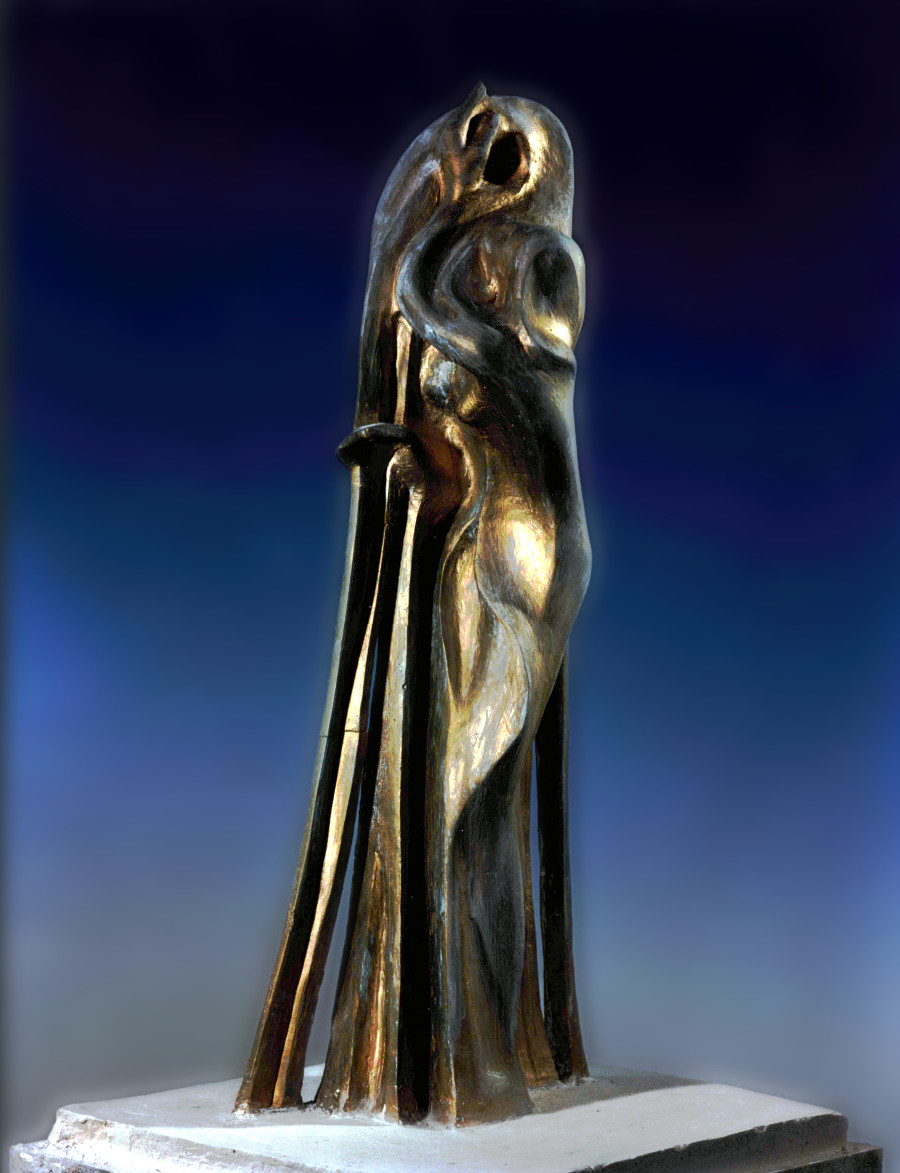 Sonnentanz, Skulptur von Ulla Scholl, 1990